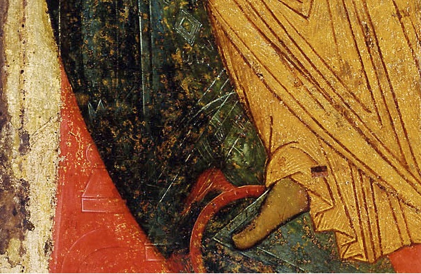 Дионисий. Спас в Силах. 1499/1500. ГТГ. Фрагмент. После расчистки оставлен фрагмент записи на гиматии